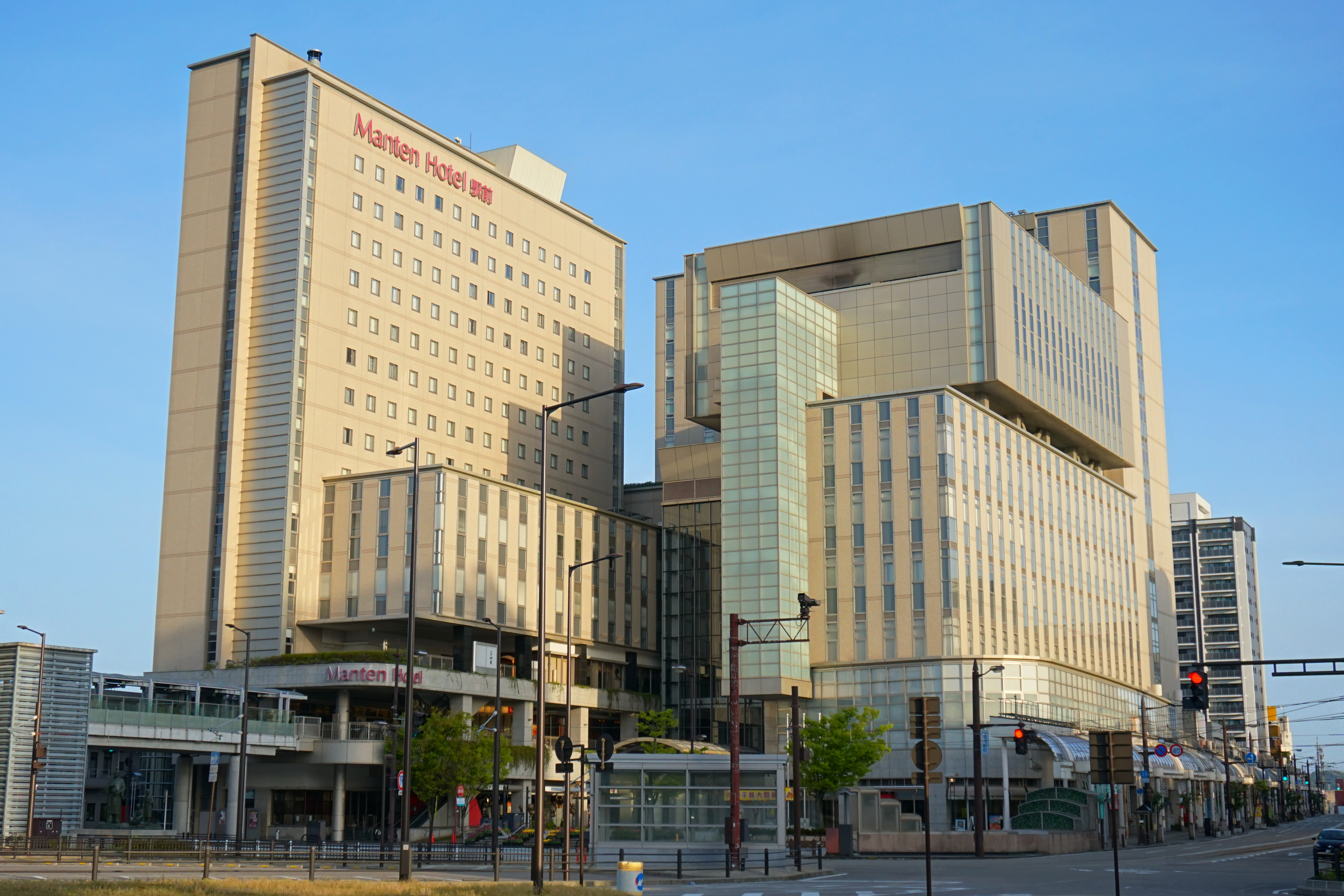 富山県高岡市・高岡駅前にある再開発複合施設、ウイング・ウイング高岡